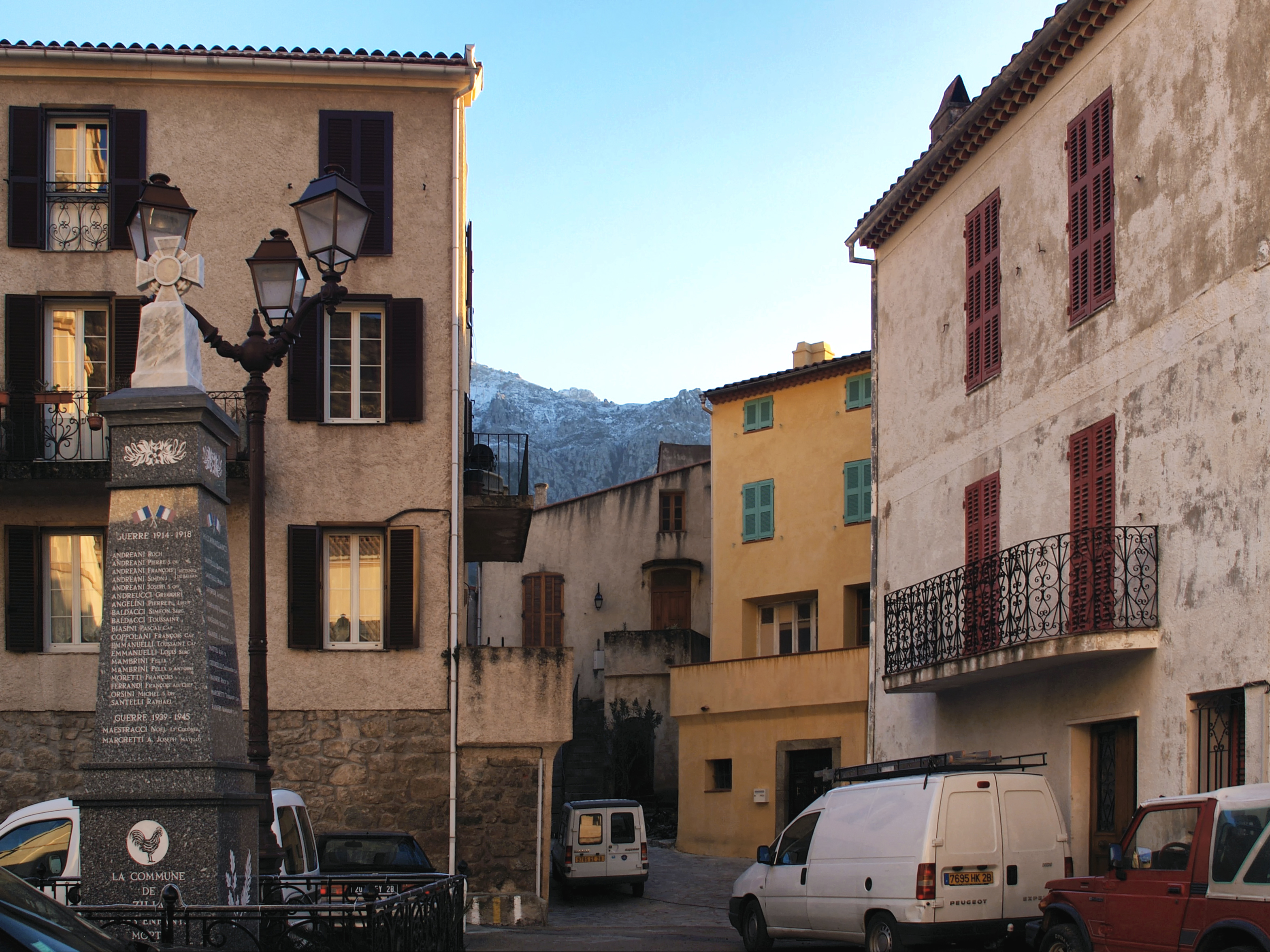 Zilia, Balagne (Haute-Corse) - La petite place du village avec le monument aux morts en face de l'église San Roccu.